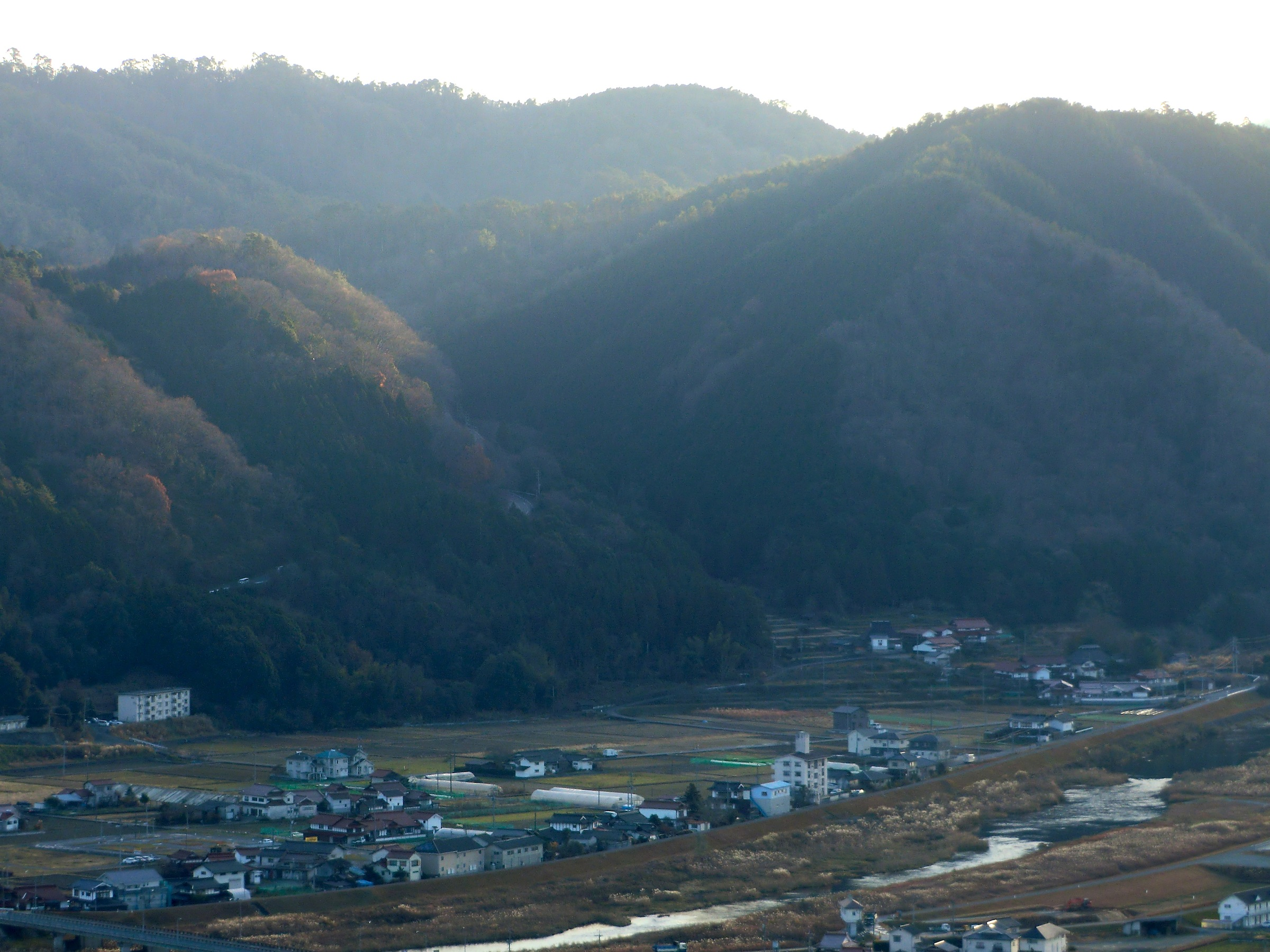 吉田郡山城の戦いの池の内古戦場跡の遠景（安芸高田市）